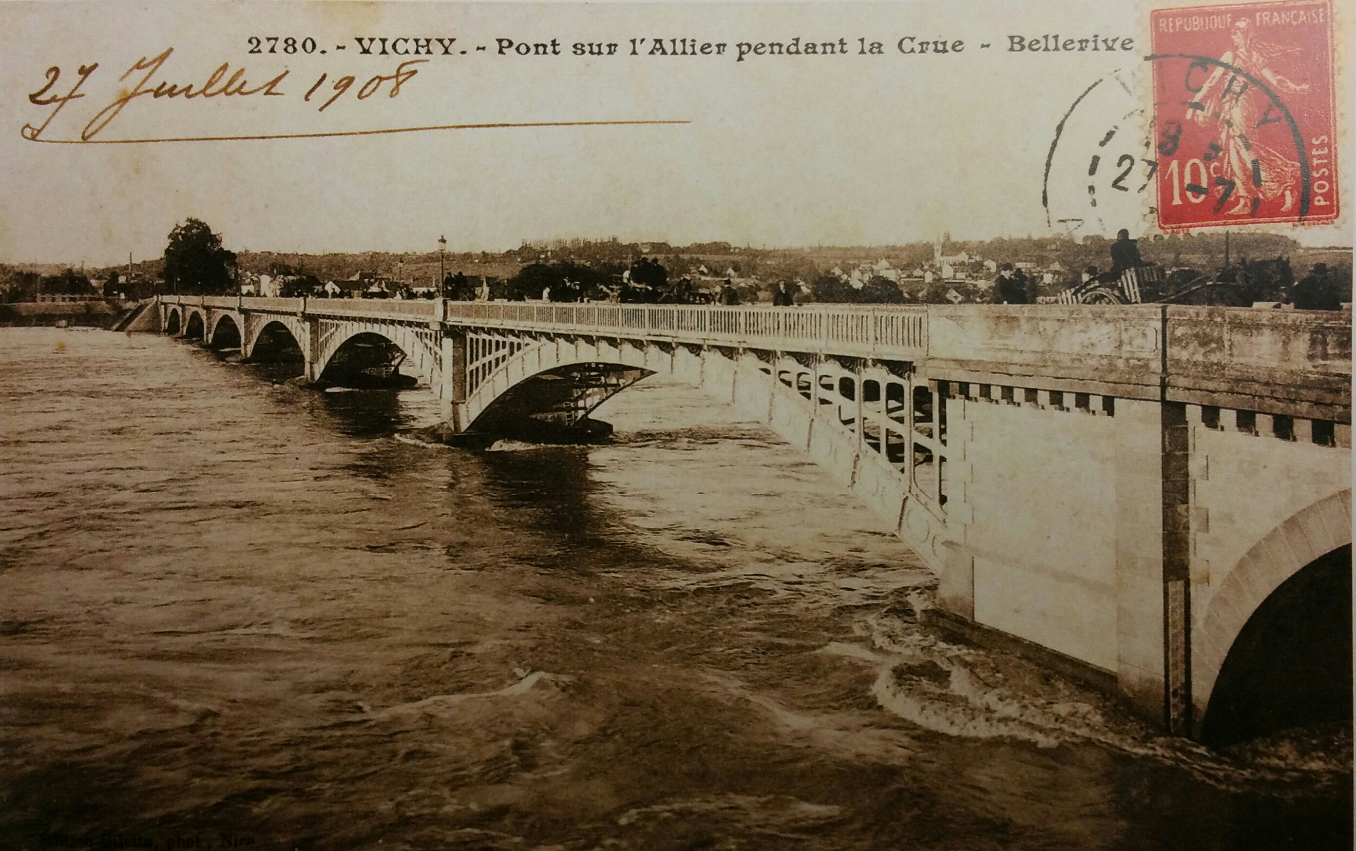 Carte postale du pont de Vichy (aujourd'hui pont de Bellerive) lors de la crue de l'Allier de 1908.